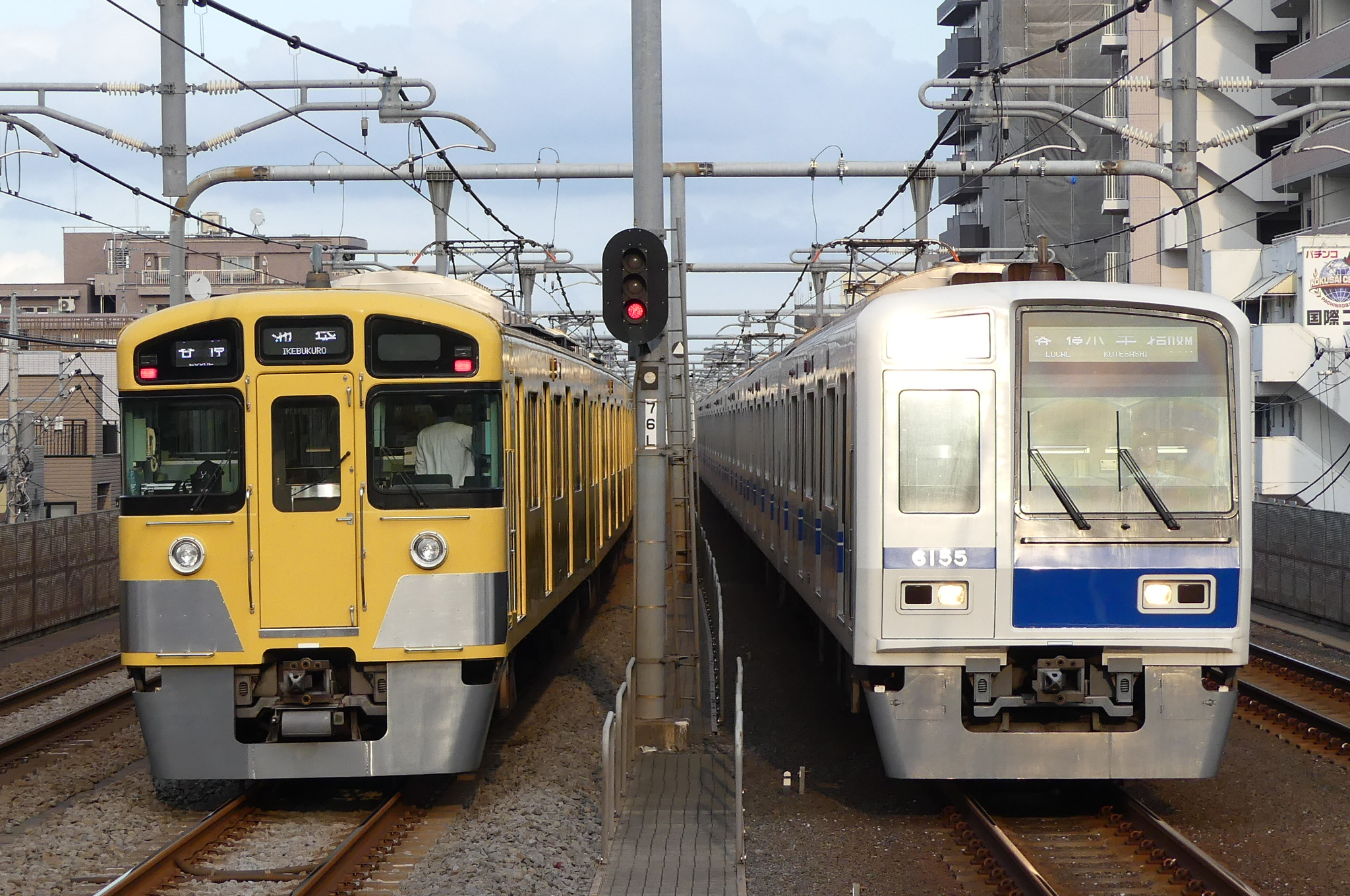 西武池袋線の2000系と6000系